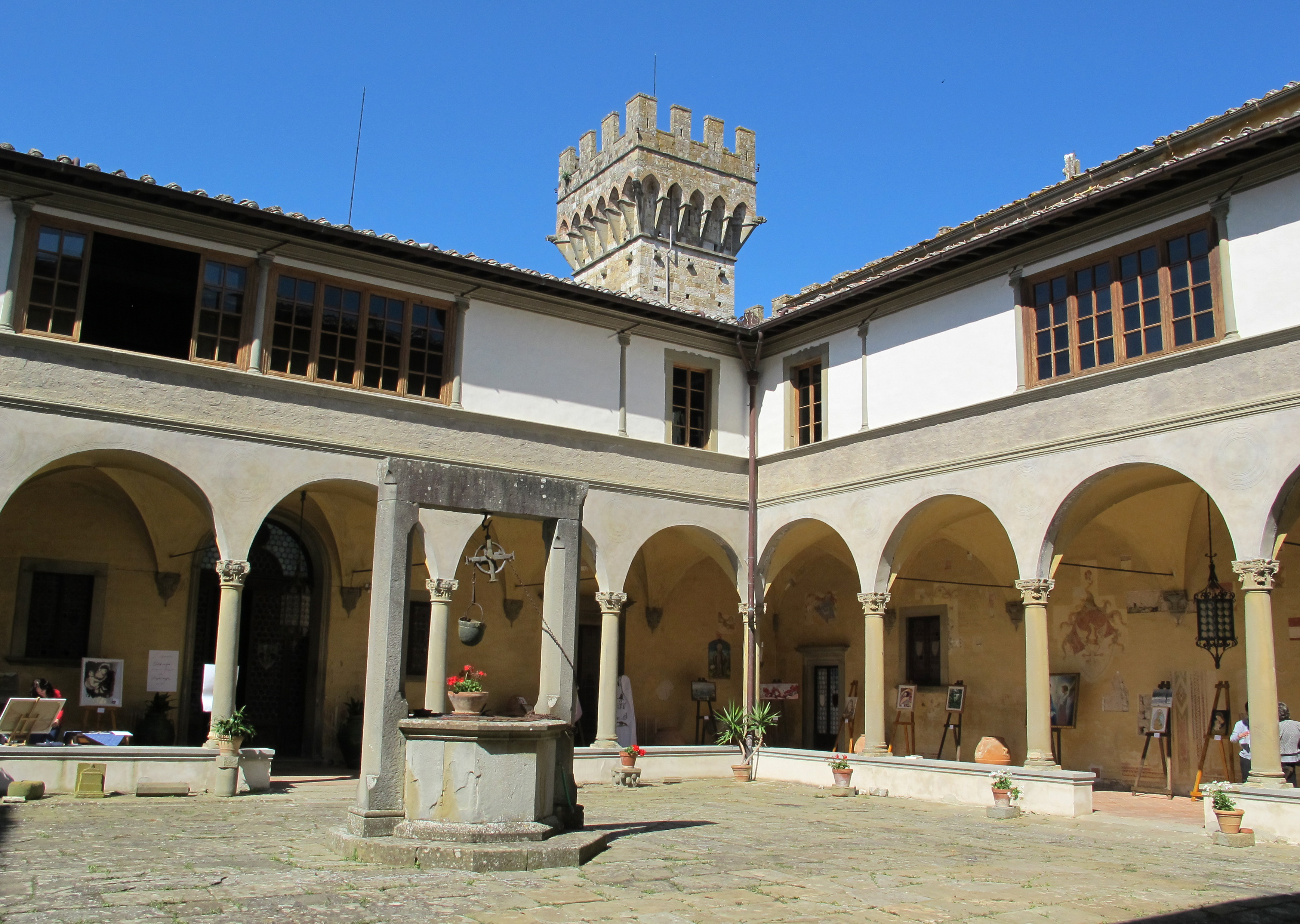 Abbazia di San Michele Arcangelo a Passignano